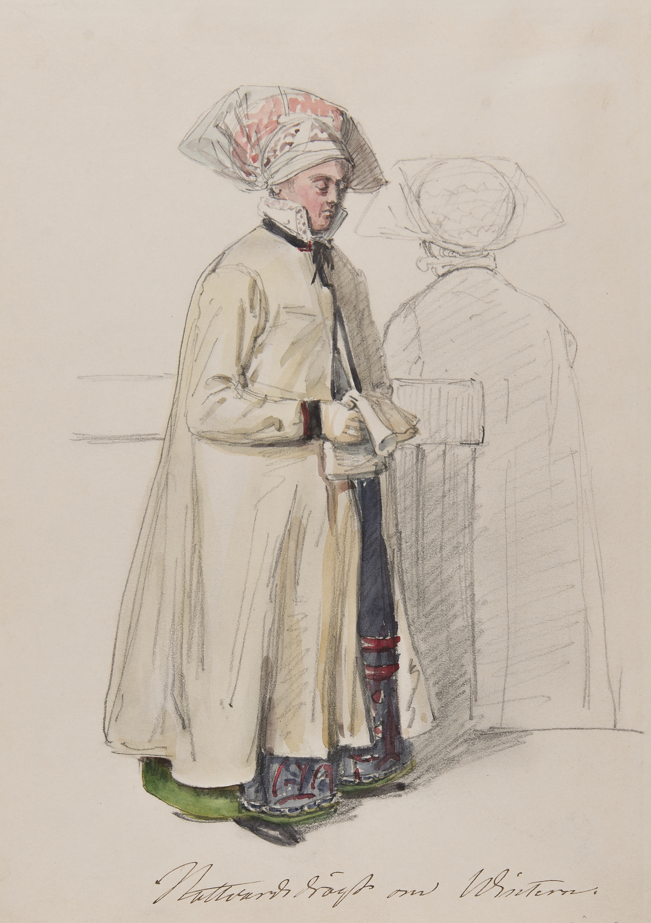 Dräkt. Nattvardsdräkt om vintern. Akvarell i storformat av J.W Wallander Depicted place: Q10610926 (Q10610926) (Härad), Österåker (Ort), Österåkers socken, Södermanland (Q10728184)